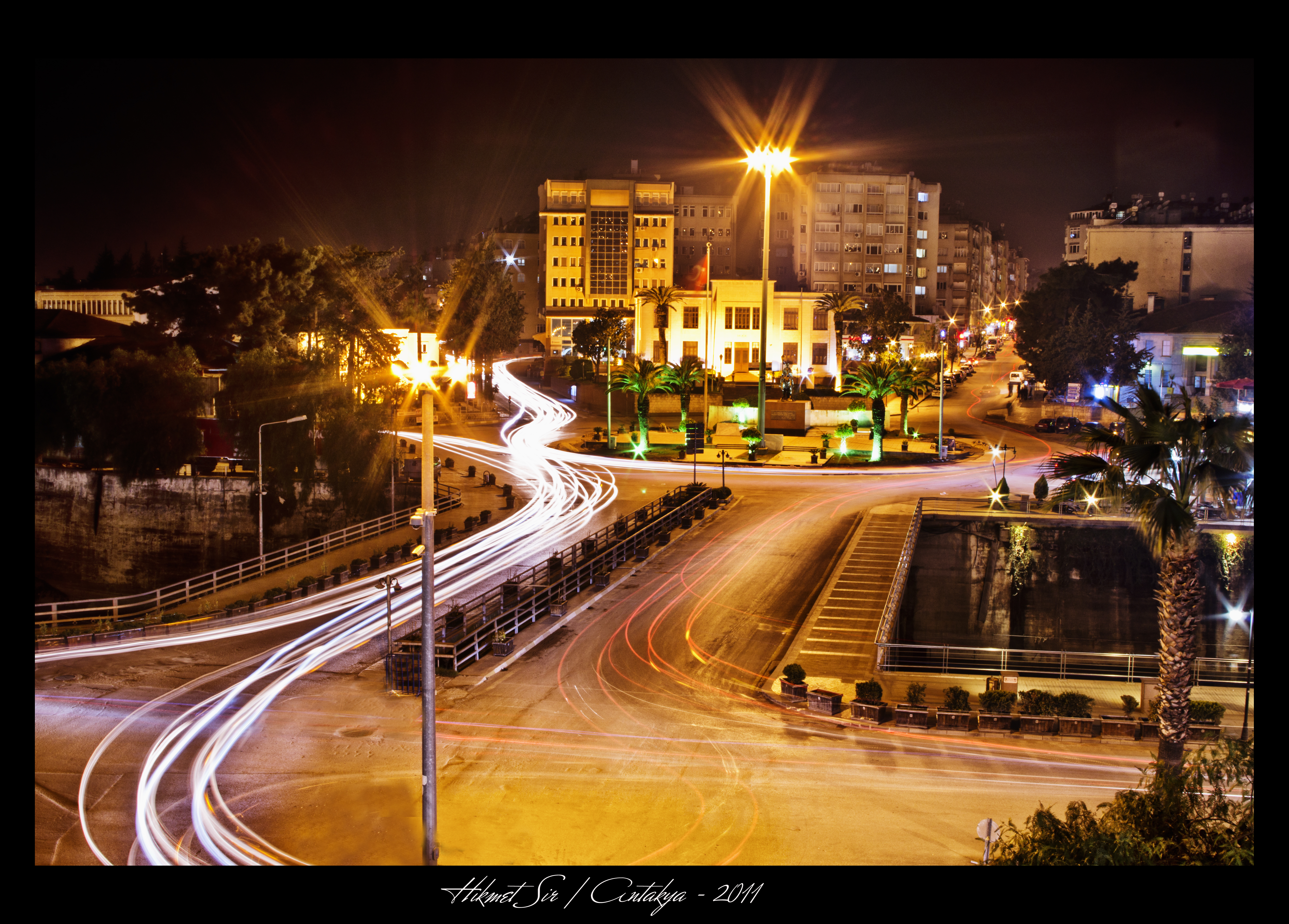 Antakya Köprübaşı akşam görüntüsü